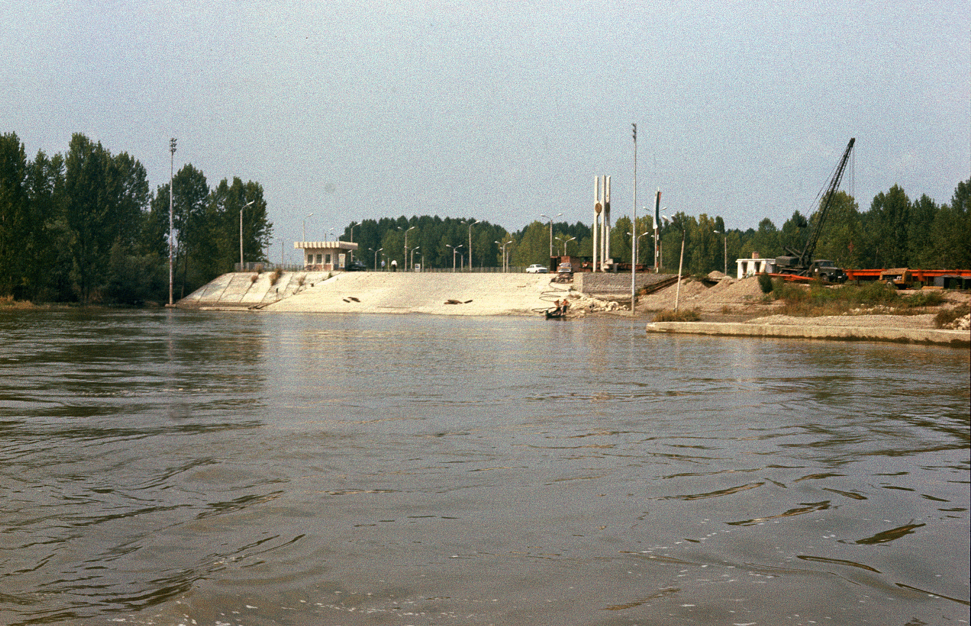 Bulgarien um 1970; Grenzübergang Vidin Calafat